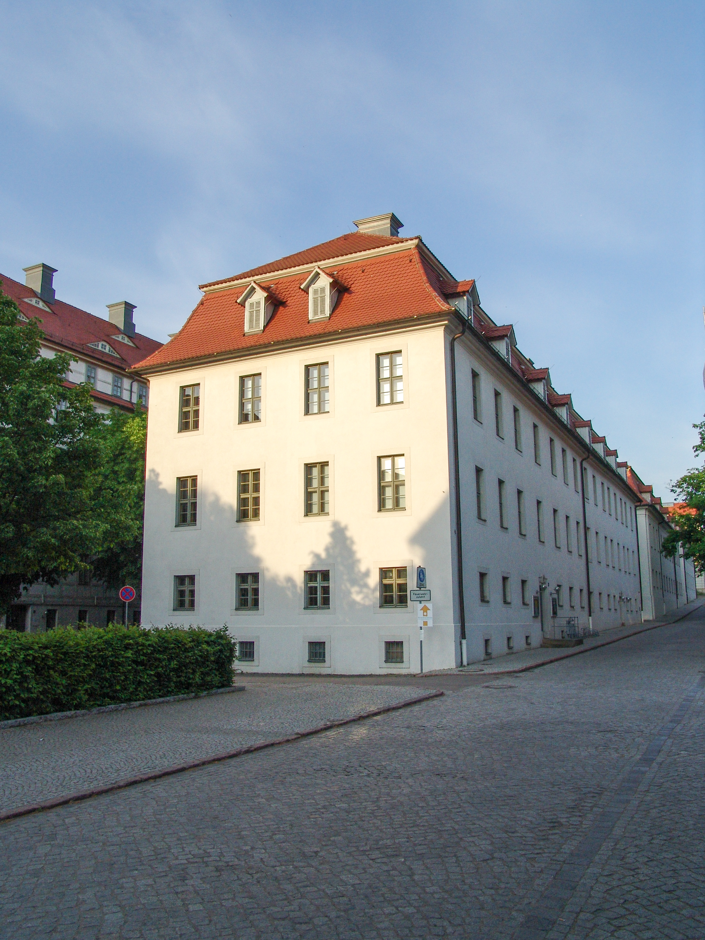 Franckesche Stiftungen in Halle, Canstein-Gebäude (Haus 24 und 23)